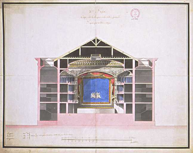 Plan aquarellé par Jacques Cellerier en 1787 représentant la coupe sur la longueur du théâtre municipale de Dijon,46x57 cm